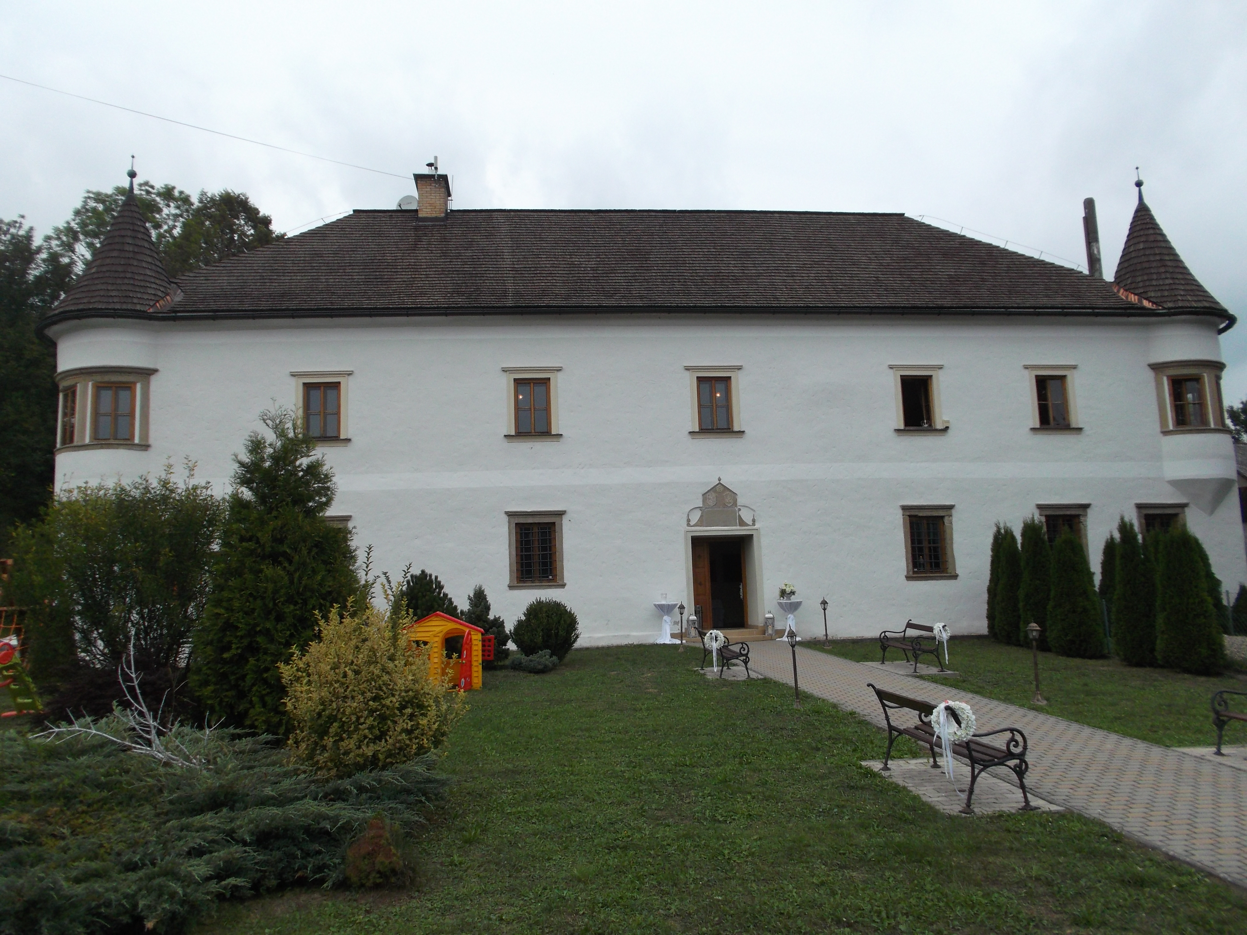 Kaštieľ